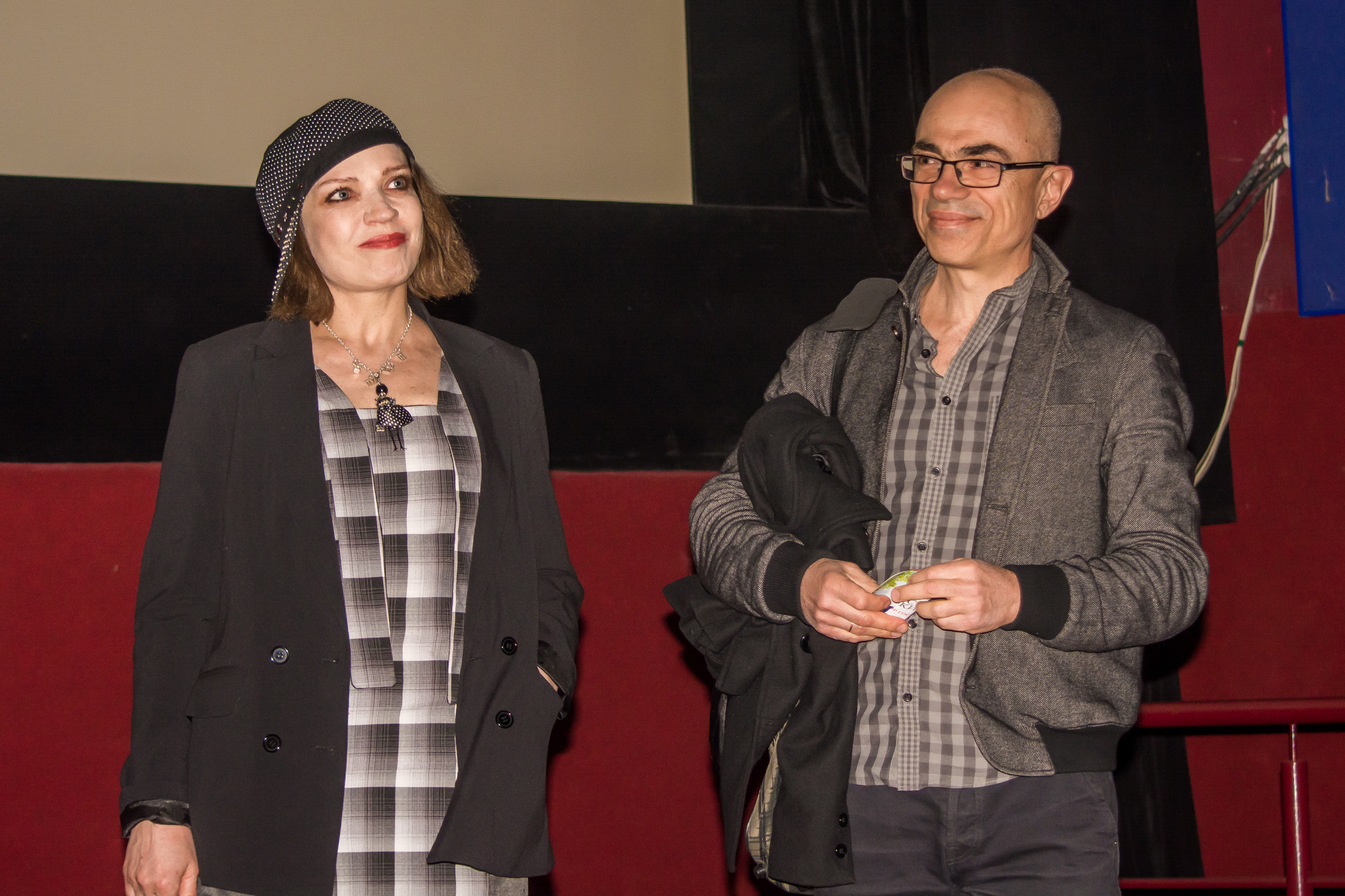 Татьяна Залужная и Николай Мелентьев на предпремьерном показе фильма «Спасти Пушкина» в Москве